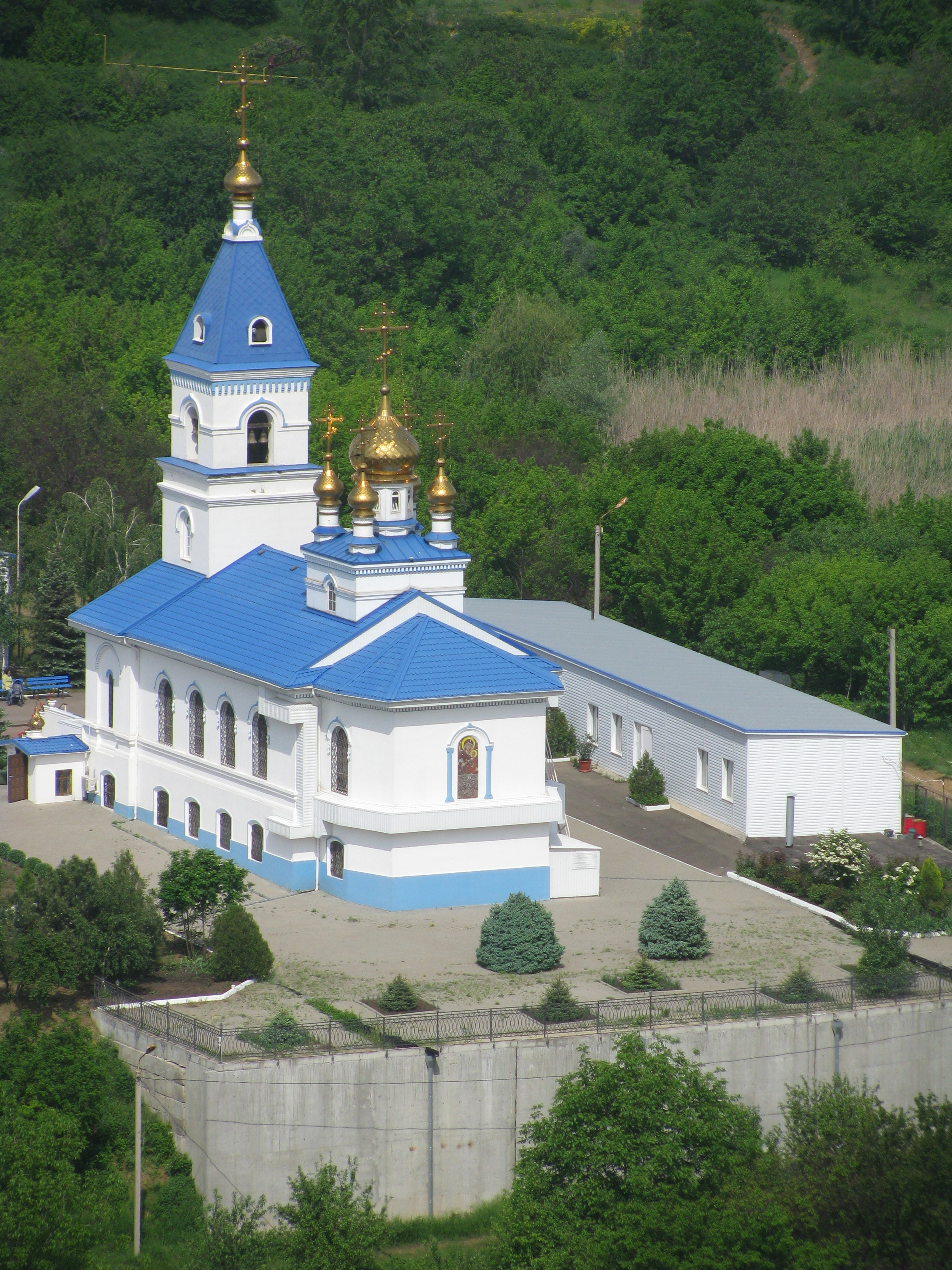 Церковь Иверской иконы Божией матери, на территории Иверского женского монастыря в городе Ростове-на-Дону